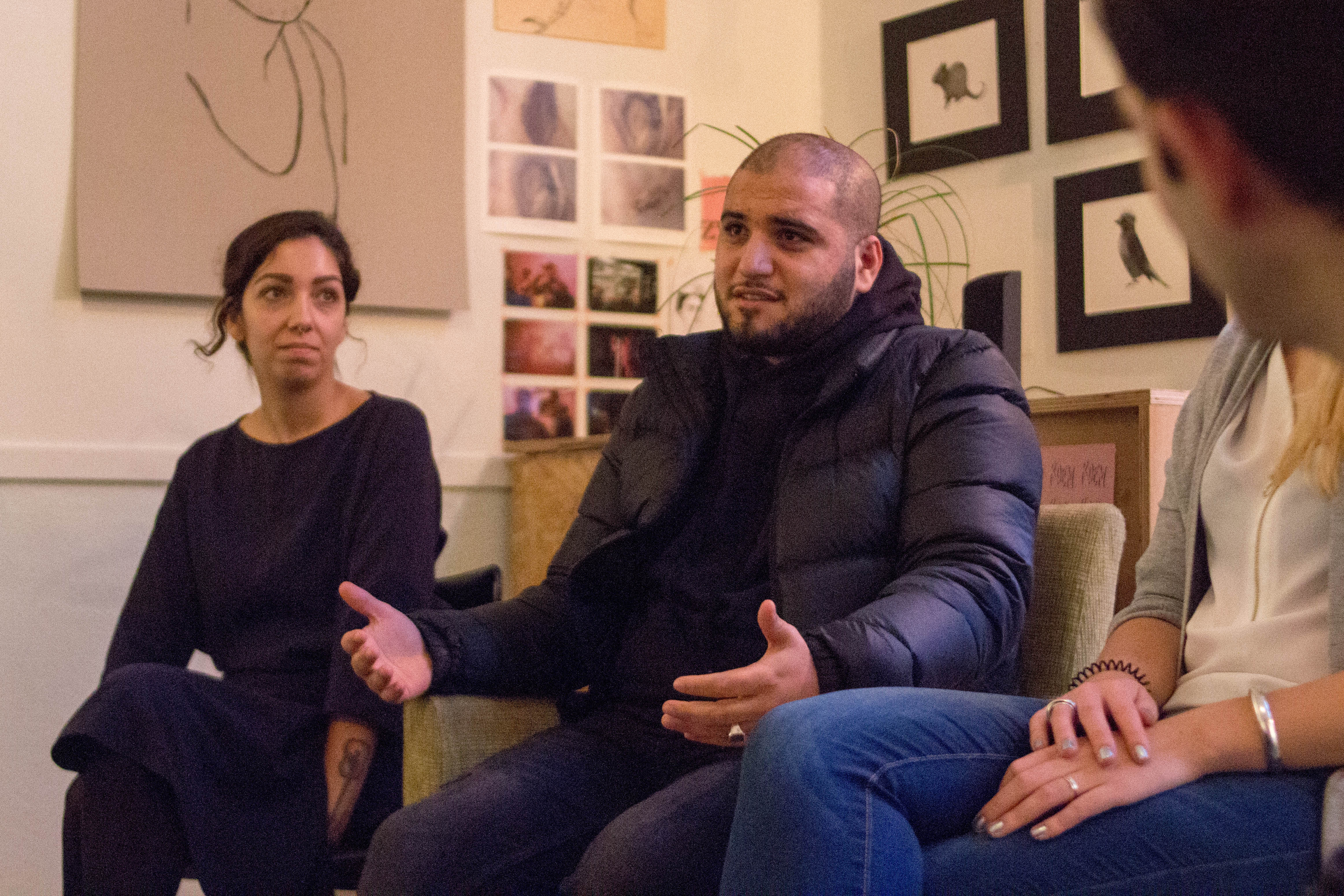 Massih Hutak bij het 100 Jaar Kiesrecht Festival